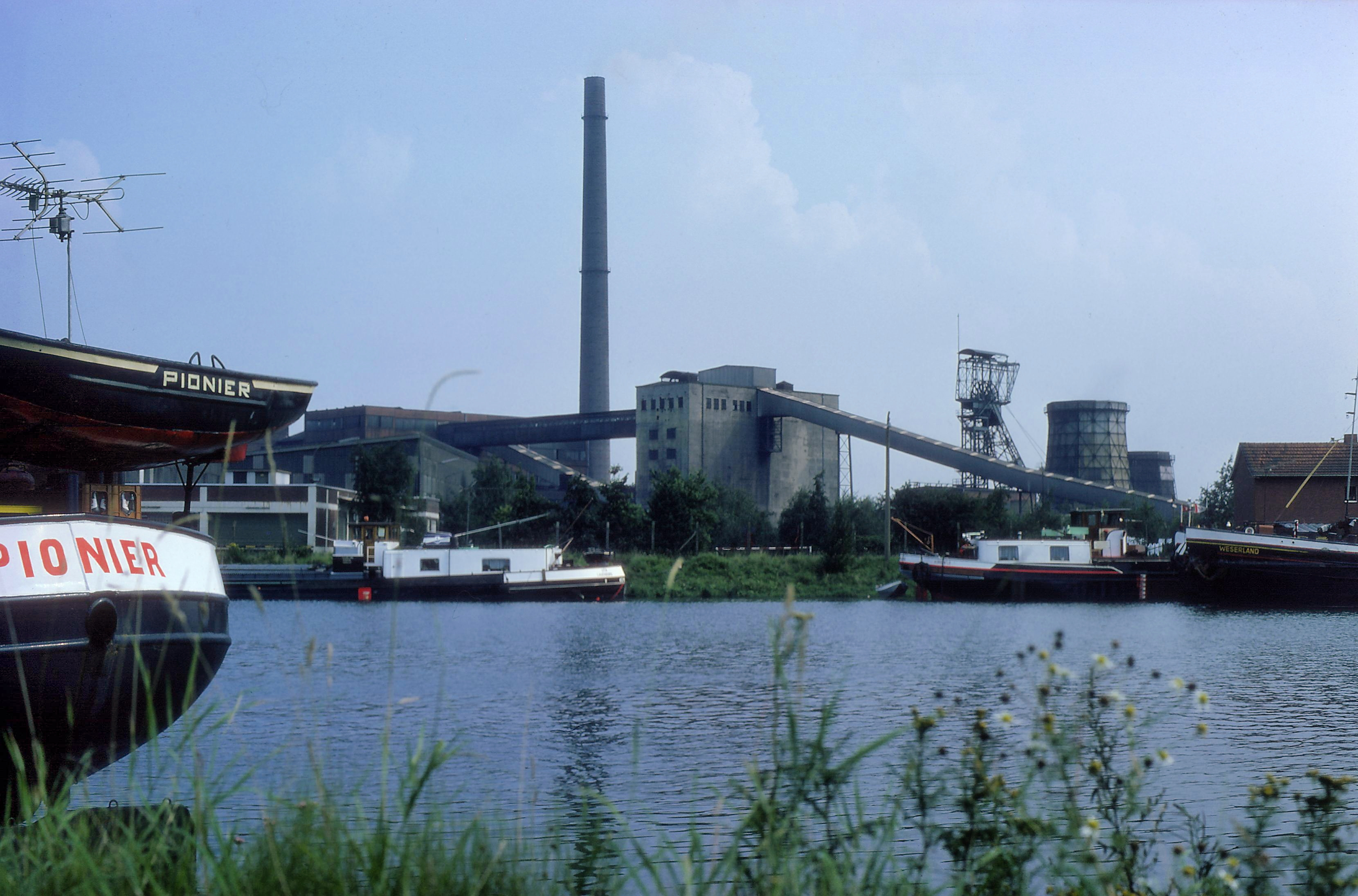 Zeche Friedrich der Große 3/4, von der Nordwestecke des heutigen Sportboothafens am Rhein-Herne-Kanal aus gesehen. Von links nach rechts: Schornstein des Kesselhauses, Kohlenwäsche und Schacht 3. Scan von einem Farbdia.